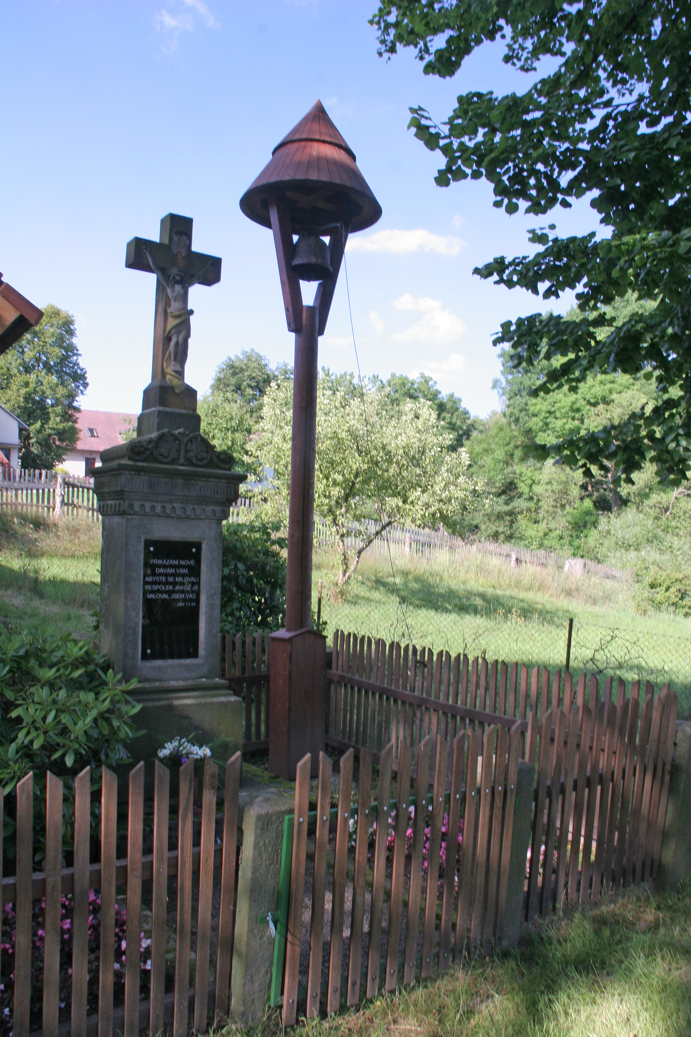 Vršov křížek a zvonička